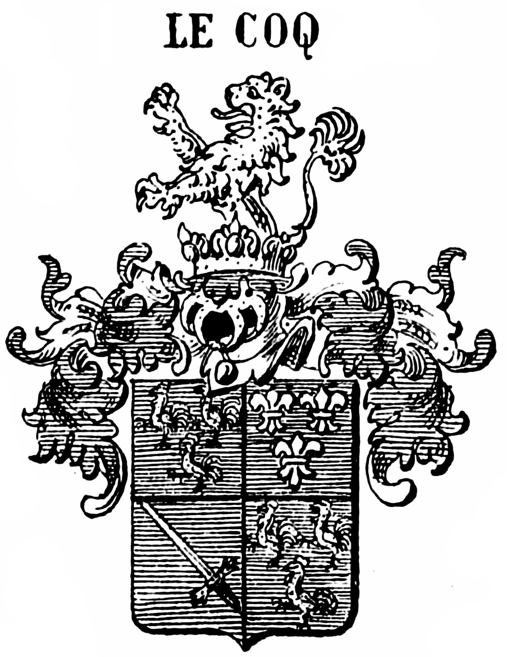 Wappen derer von Le Coq von 1874/1875